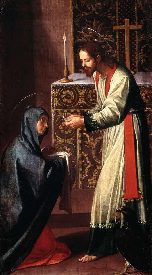 São João Evangelista dando a comunhão à Virgemtitle QS:P1476,pt:"São João Evangelista dando a comunhão à Virgem" label QS:Lpt,"São João Evangelista dando a comunhão à Virgem"